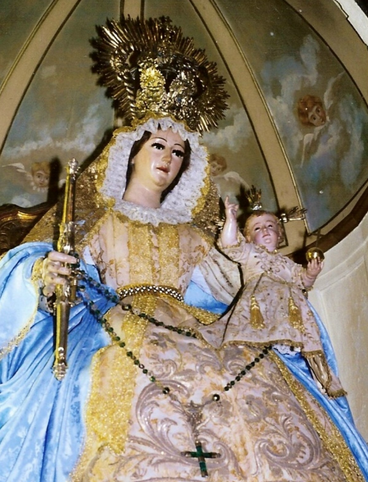 Titular de la Hermandad de Nuestra Señora del Sagrario de Toledo y su Compatrono el Señor San José.Autor desconocido.